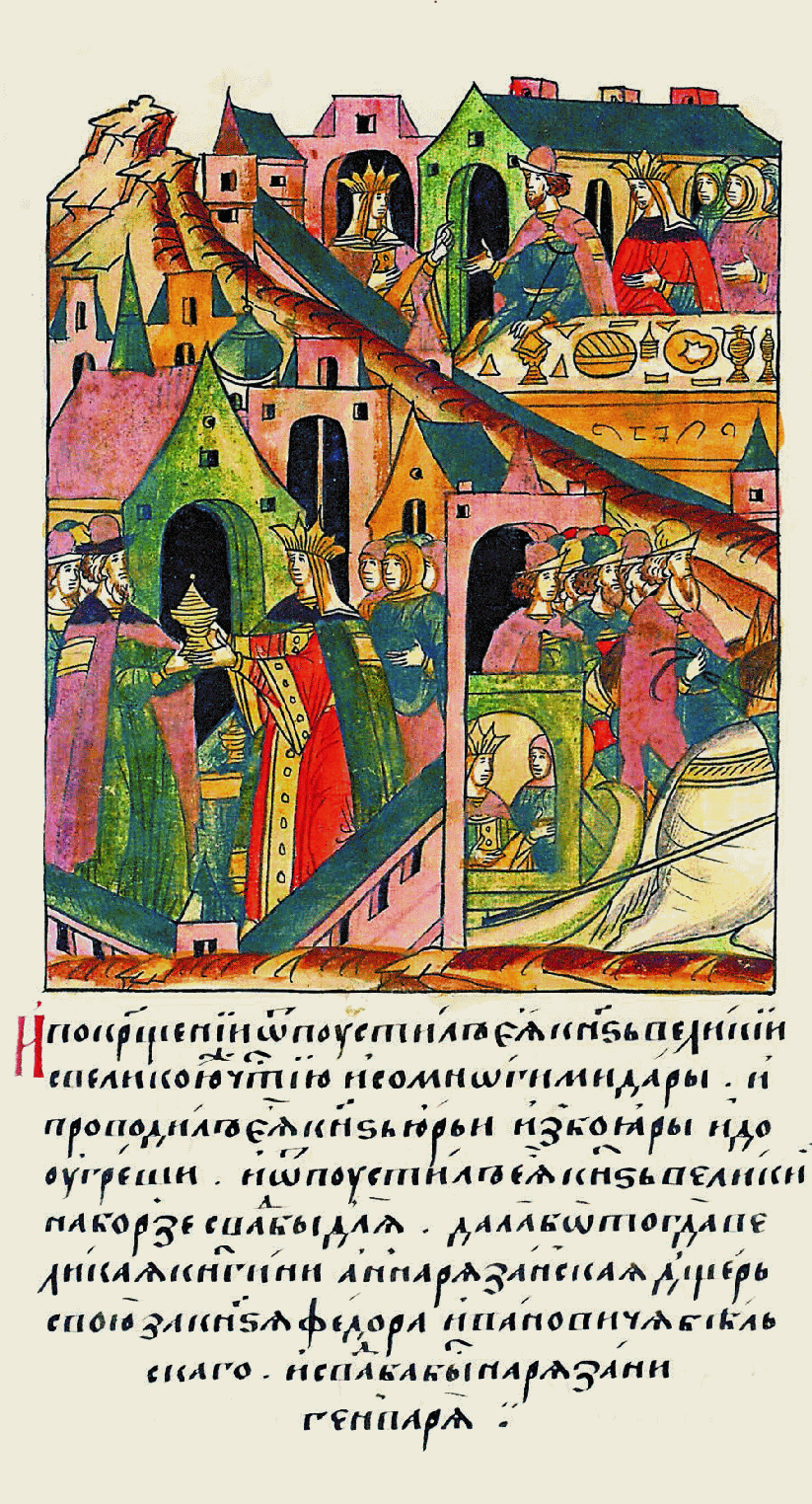 и после Крещения отпустил ее великий князь с великими по- честями и со многими дарами, и проводил ее князь Юрий с боярами до Николо-Угрешского монастыря. И отпу- стил ее великий князь так скоро из-за свадь- бы, так как отдавала тогда великая княгиня Анна Рязанская свою дочь за князя Федора Ивановича Вельского, и свадьба была в Ряза- ни в январе.